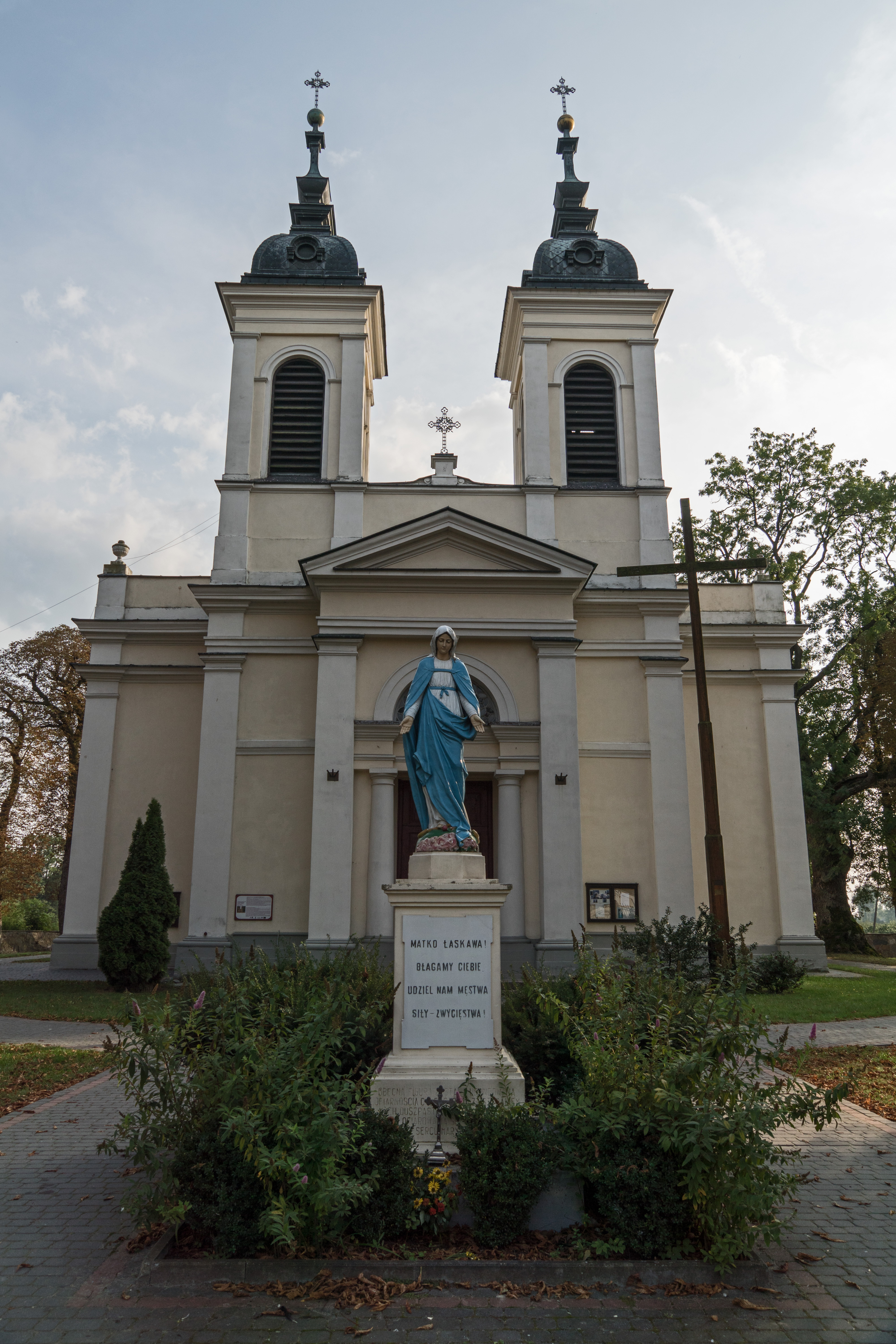 Sanniki, Kościół Św. Trójcy Wikidata has entry Q30071596 with data related to this item.